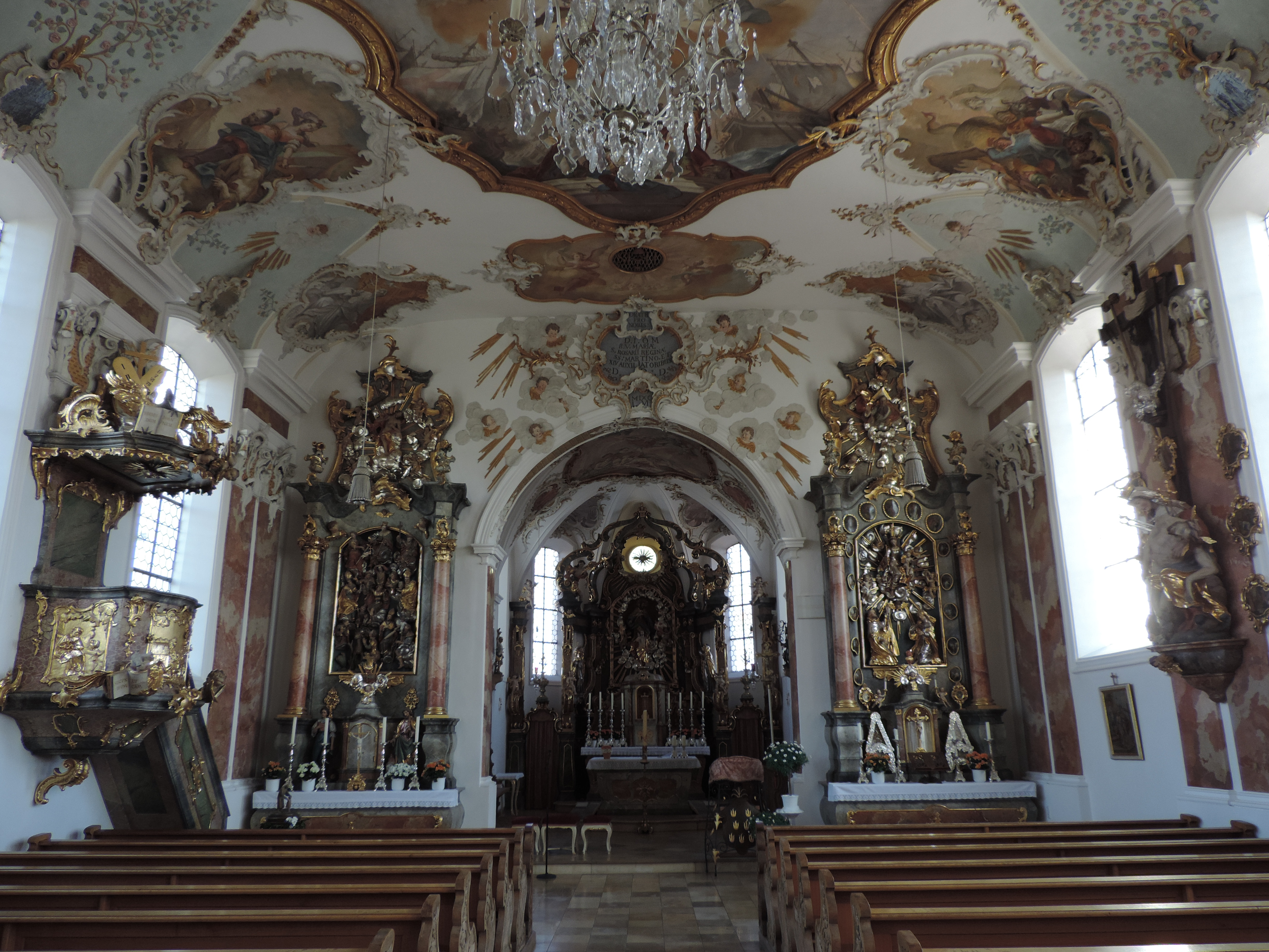 Innenraum